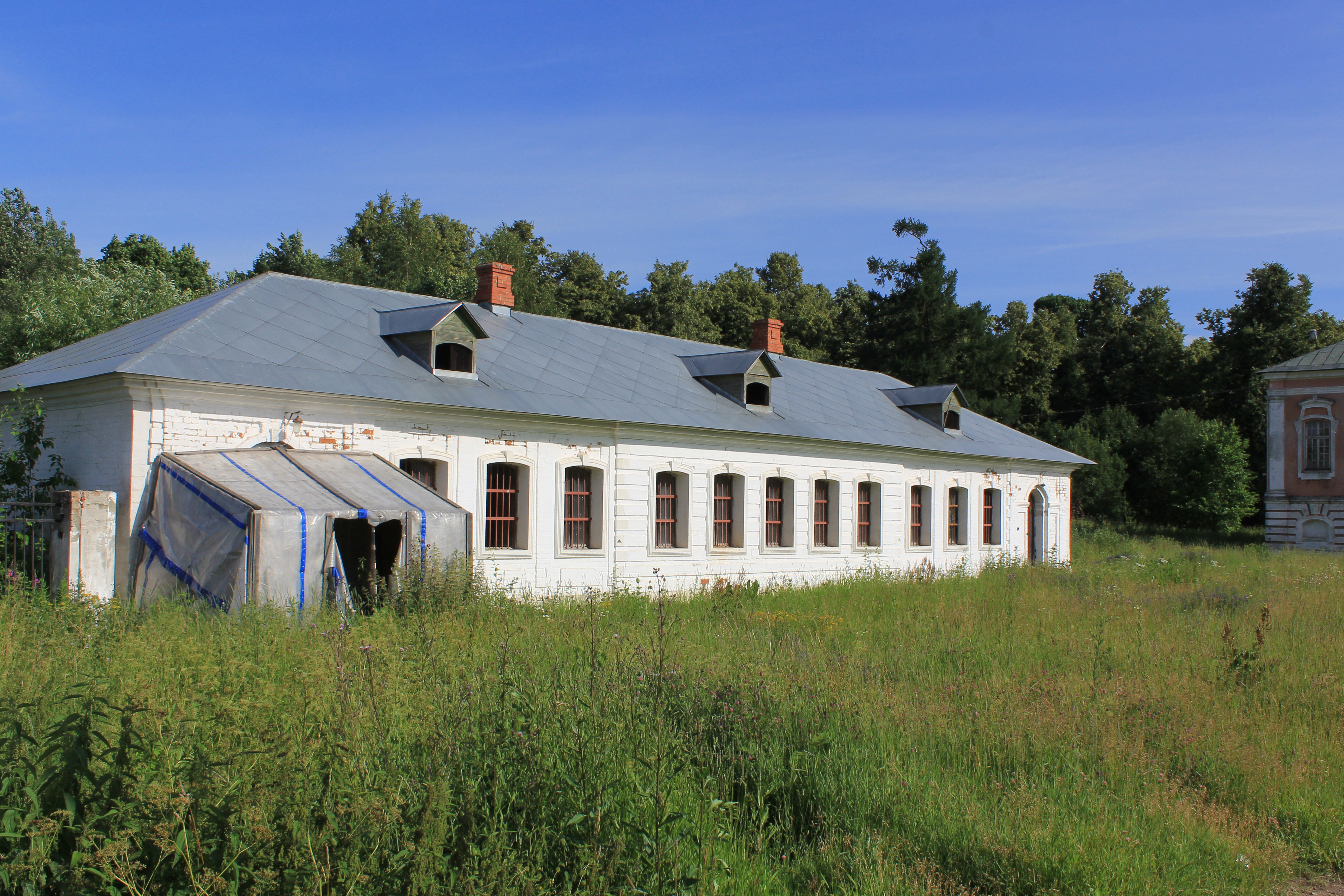 Флигель в усадьбе Ясенево